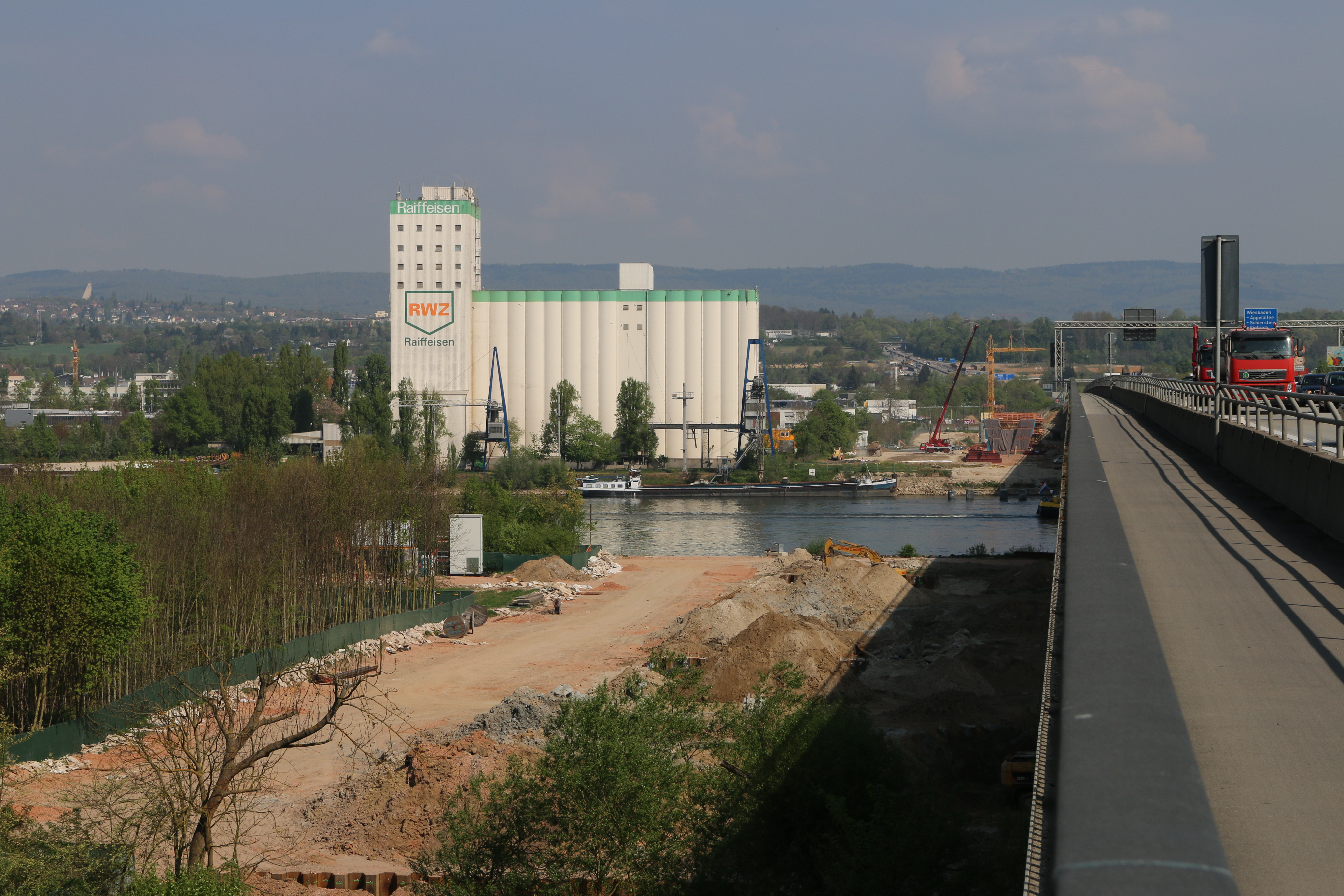 Neubau der Schiersteiner Brücke: Das Baufeld auf der Mombacher Seite von der alten Brücke aus gesehen